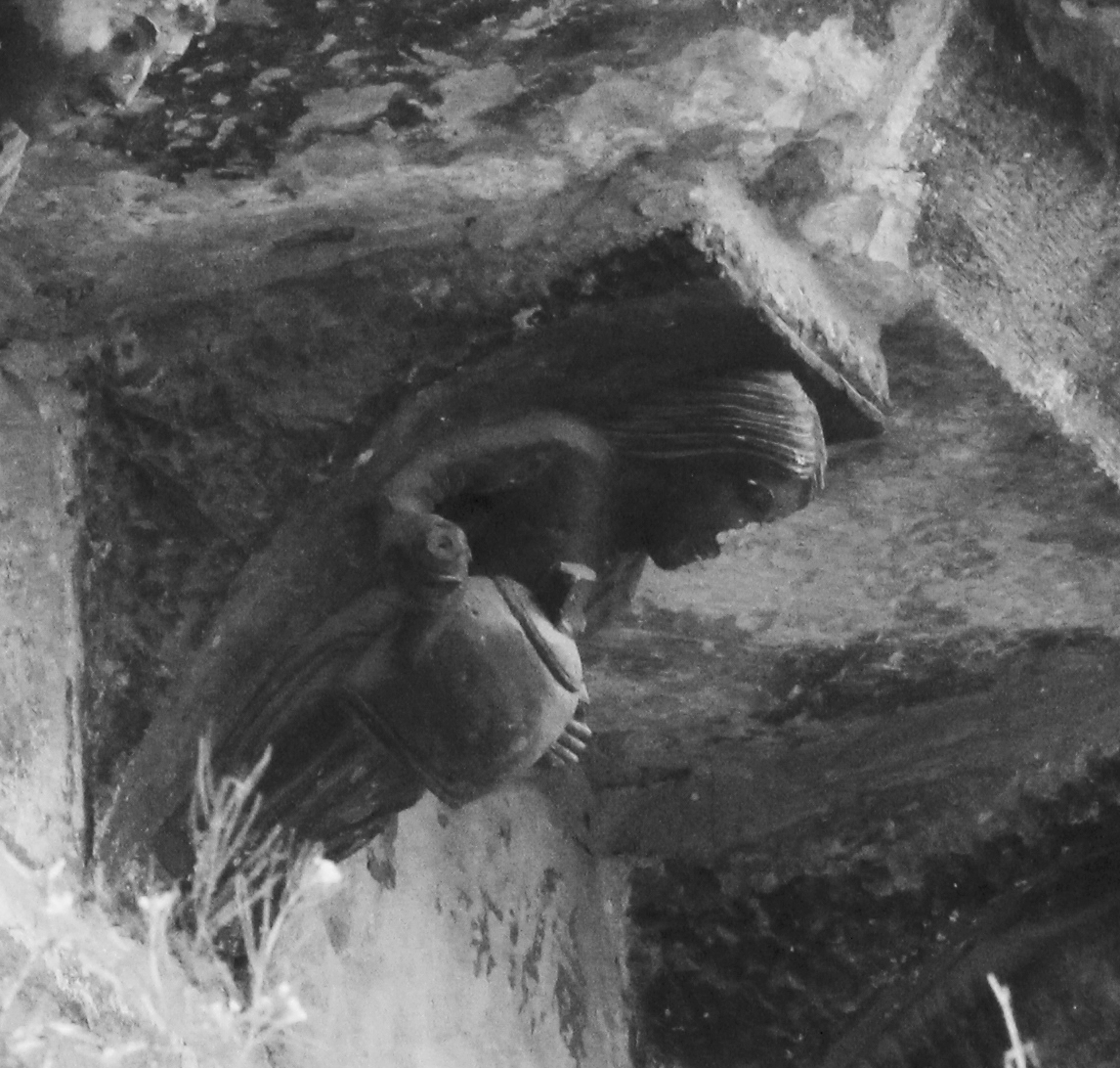 Modillón en el lado derecho que representa una aguadora con un cantaro llamado pedarra